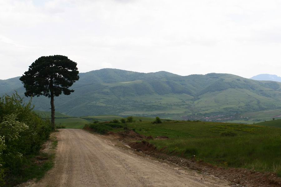 Comuna Iara, judeţul Cluj